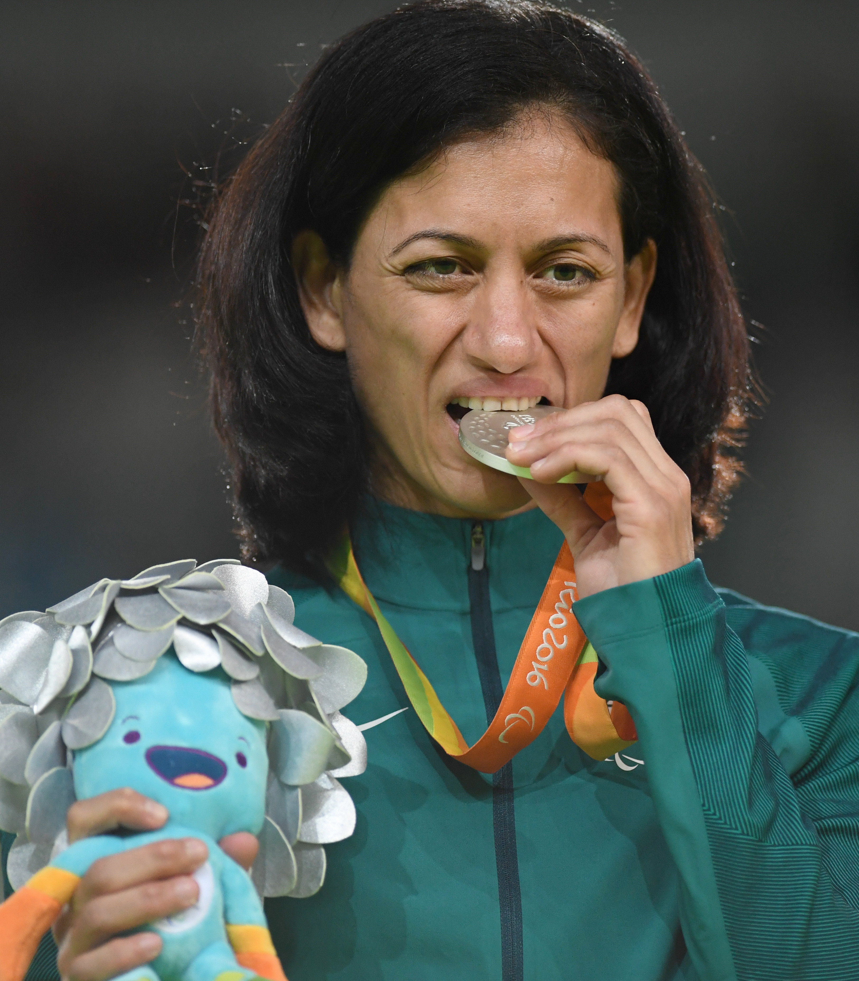 Rio de Janeiro - A brasileira Lucia Araújo perde para a ucraniana Inna Cherniak na final do judô feminino 57kg e fica com a medalha de prata na Paralímpiada Rio 2016 (Tânia Rêgo/Agência Brasil)